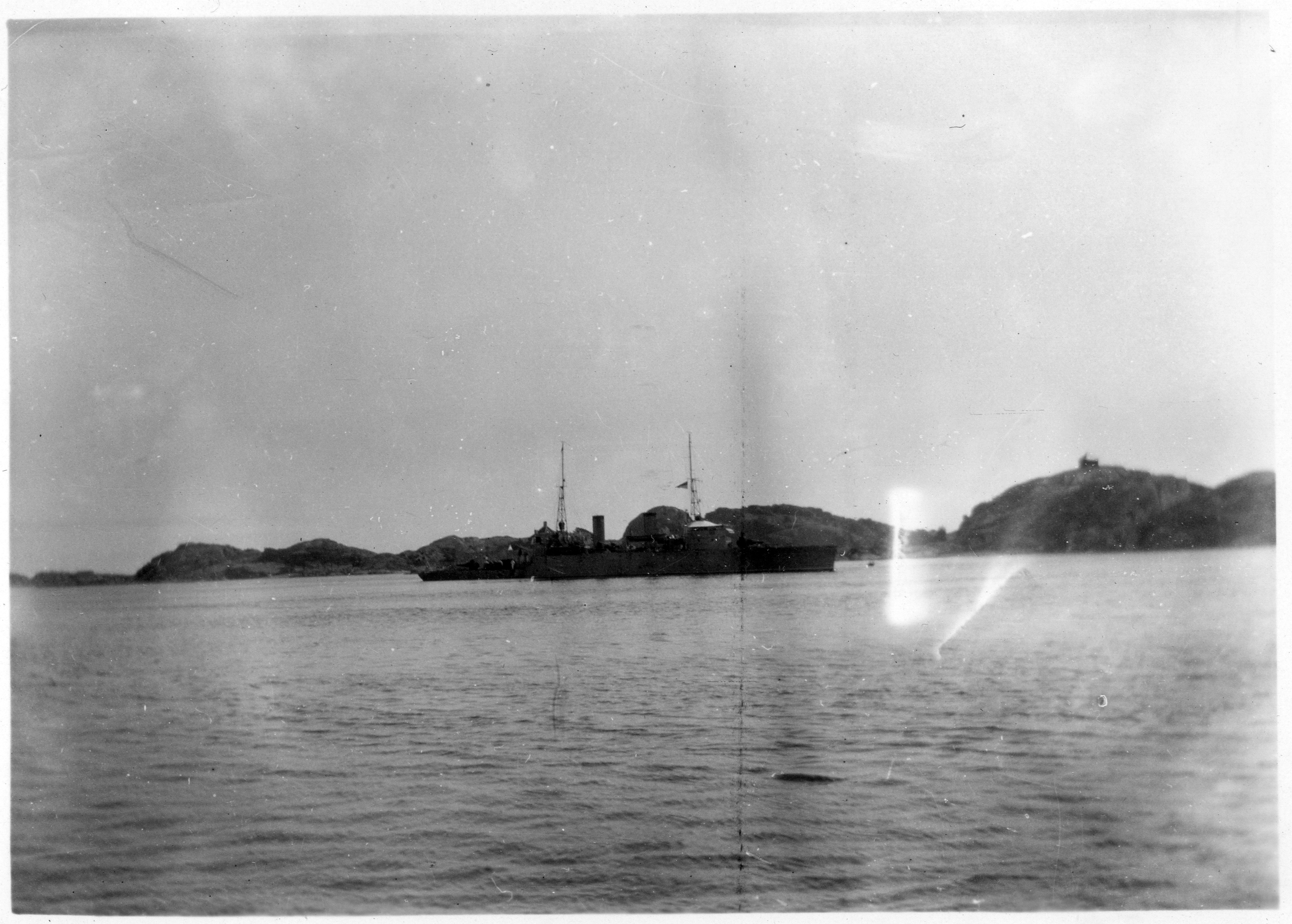 Bildet er hentet fra Arkivverket. Mineutlegger i Stavern Arkivinstitusjon : Statsarkivet i Kongsberg Arkivnavn : Telemark politikammer Sted : Norge, Vestfold, Larvik, Stavern Emneord: Hav, Skip, Båt Avbildet